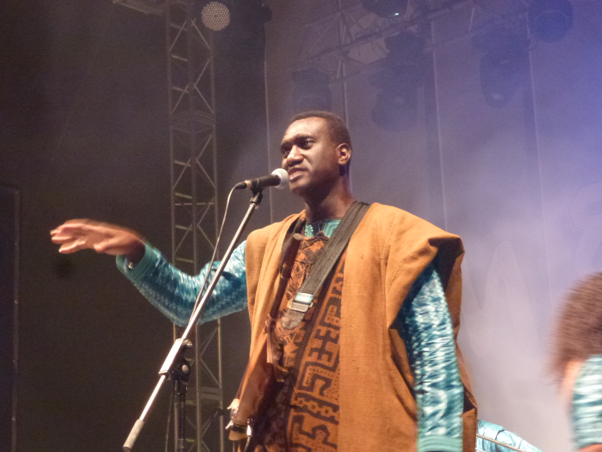 Bassekou Koiaté beim Festival das Musica do Mundo FMM 2013 in Sines/Portugal